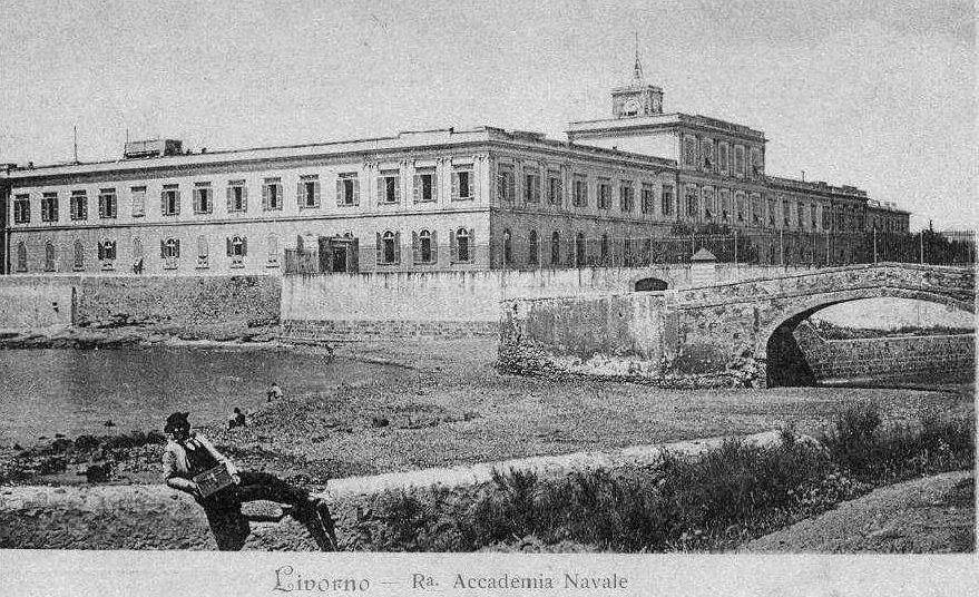 Particolare della foce del Rio Maggiore su cartolina, anno 1927.